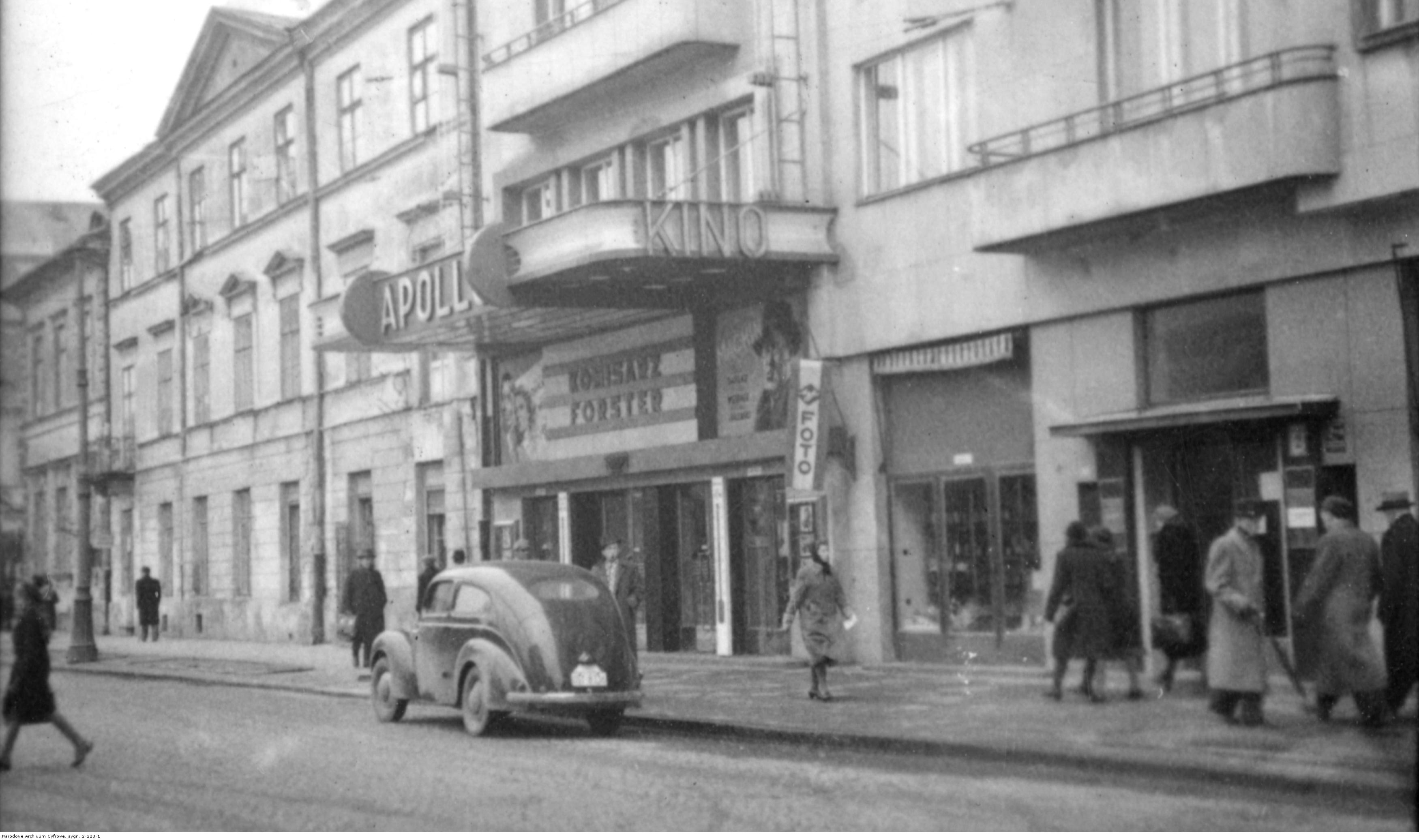 Fragment placu Trzech Krzyży. Widoczne wejście do kina Apollo (przedwojenna nazwa kino Napoleon) oraz kamienica Instytutu Głuchoniemych.